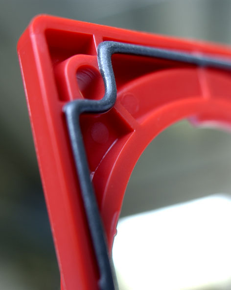 Ein per FIPFG abgedichtetes Bauteil